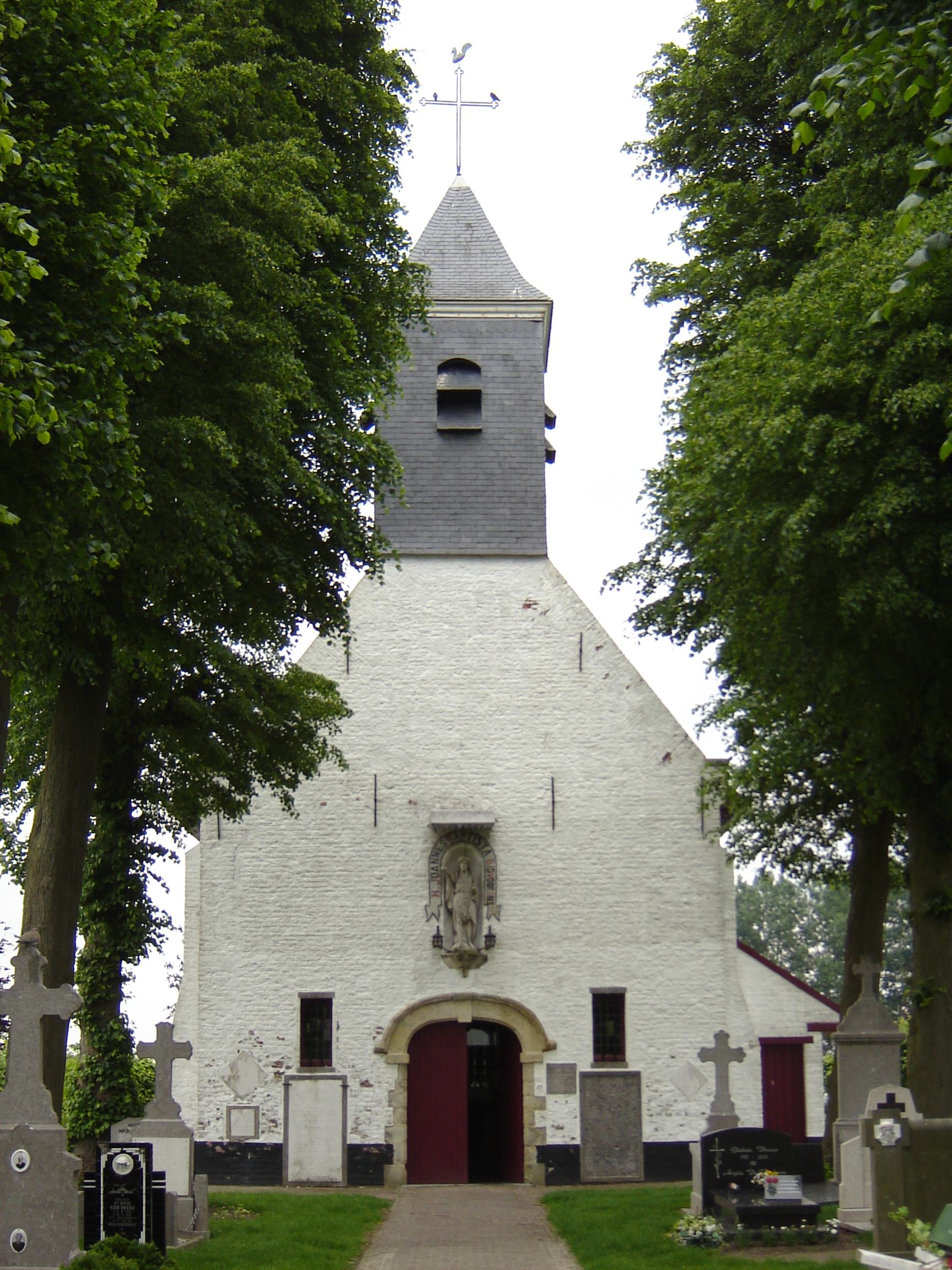 Sint-Jan-Baptistkerk in Sint-Jan-in-Eremo Church of Saint John Baptist in Sint-Jan-in-Eremo, Sint-Laureins, East Flanders, Belgium